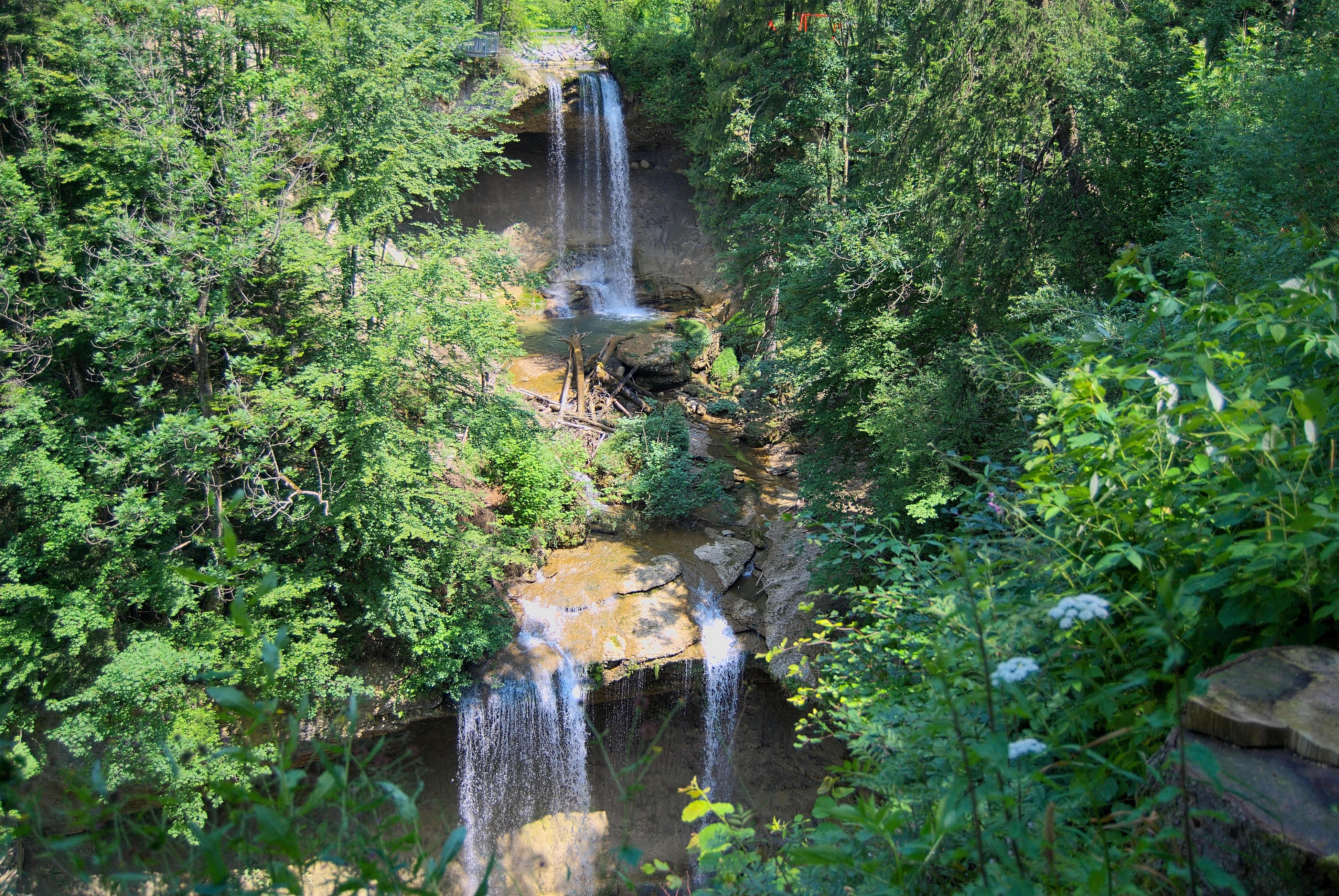 Blick auf den 2. und 3. Wasserfall der Scheidegger Wasserfälle (Geotop 776R007 und Naturdenkmal im Naturschutzgebiet 00424.01 „Rohrachschlucht“), Landkreis Lindau, Bayern